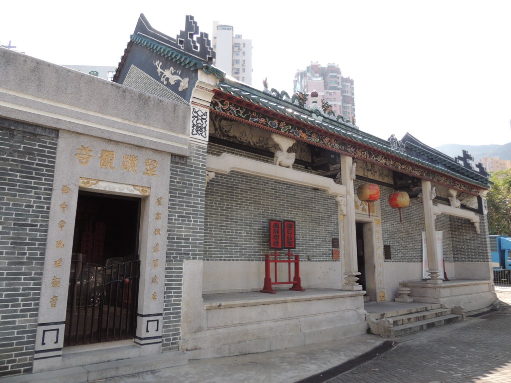 Tam Kung Temple, Shau Kei Wan